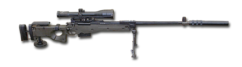 G22-Scharfschützen-Gewehr der Bundeswehr G22-Scharfschützen-Gewehr der Bundeswehr